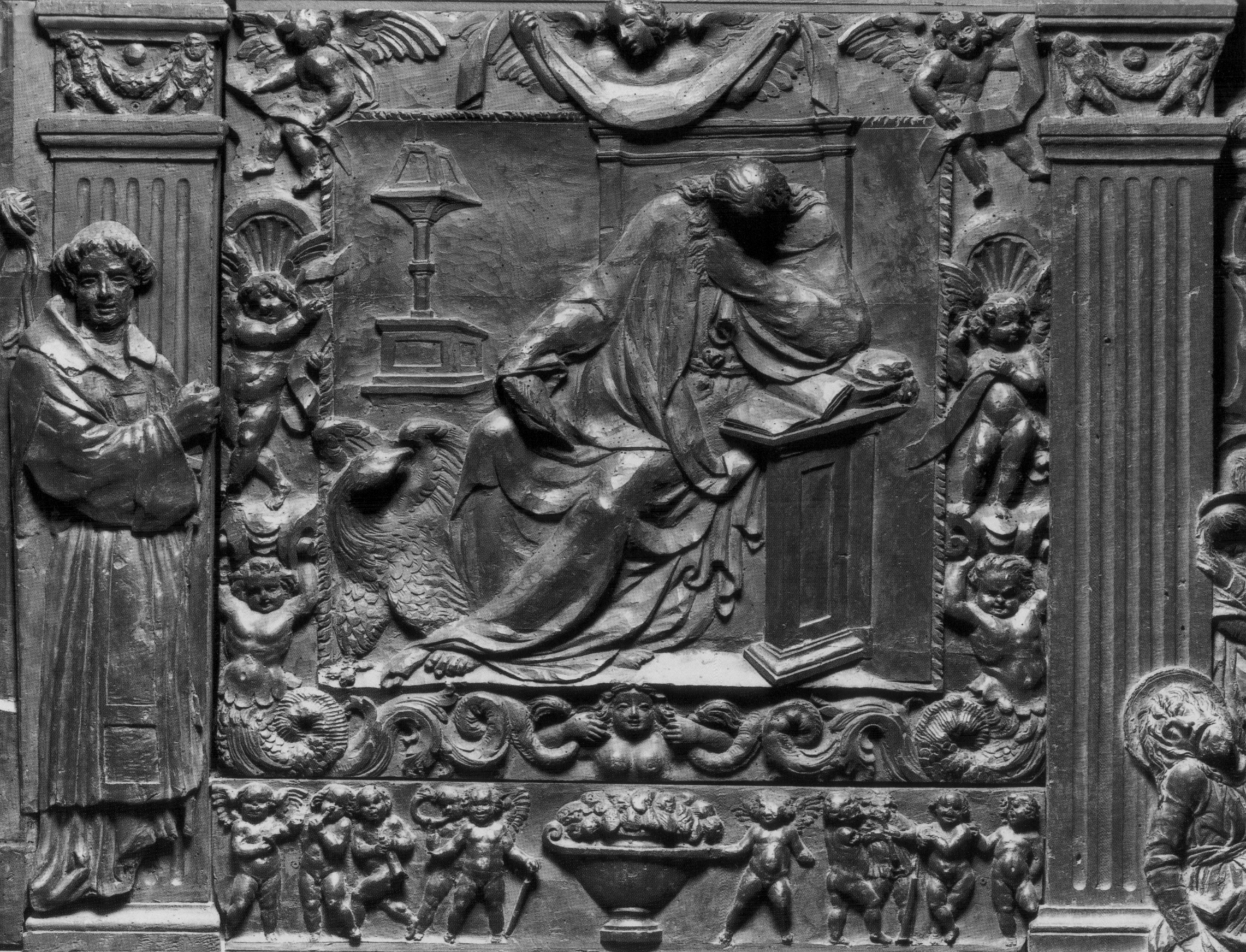 Il Pulpito della Passione, in San Lorenzo a Firenze, opera di Donatello. Dettaglio: San Giovanni Evangelista, pannello aggiunto nel XVII secolo. Fotografia Alinari, 1852.